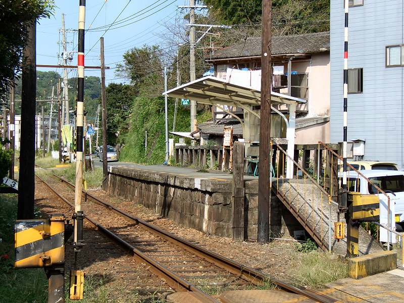 熊本電気鉄道韓々坂駅 奥が北熊本駅方面、手前が上熊本駅方面。 撮影者/著者/著作権保有者 : MK Products (本人がアップロード) 撮影日 : 2006/09/24 韓々坂駅用にアップロードした画像です。良い画像があれば別の画像に変えてください。 この写真は一部加工しています。